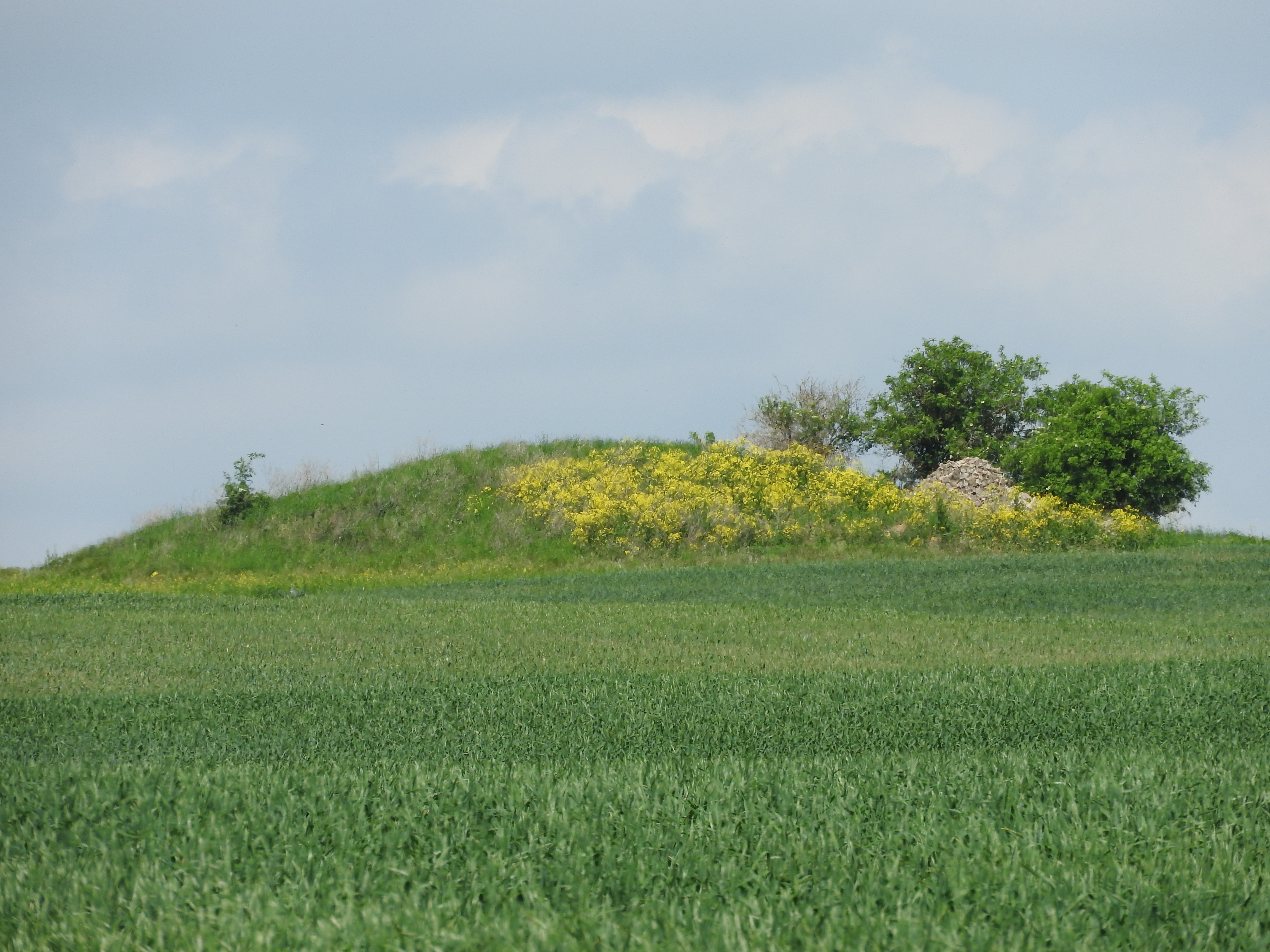 Derfflinger Hügel, Thüringen